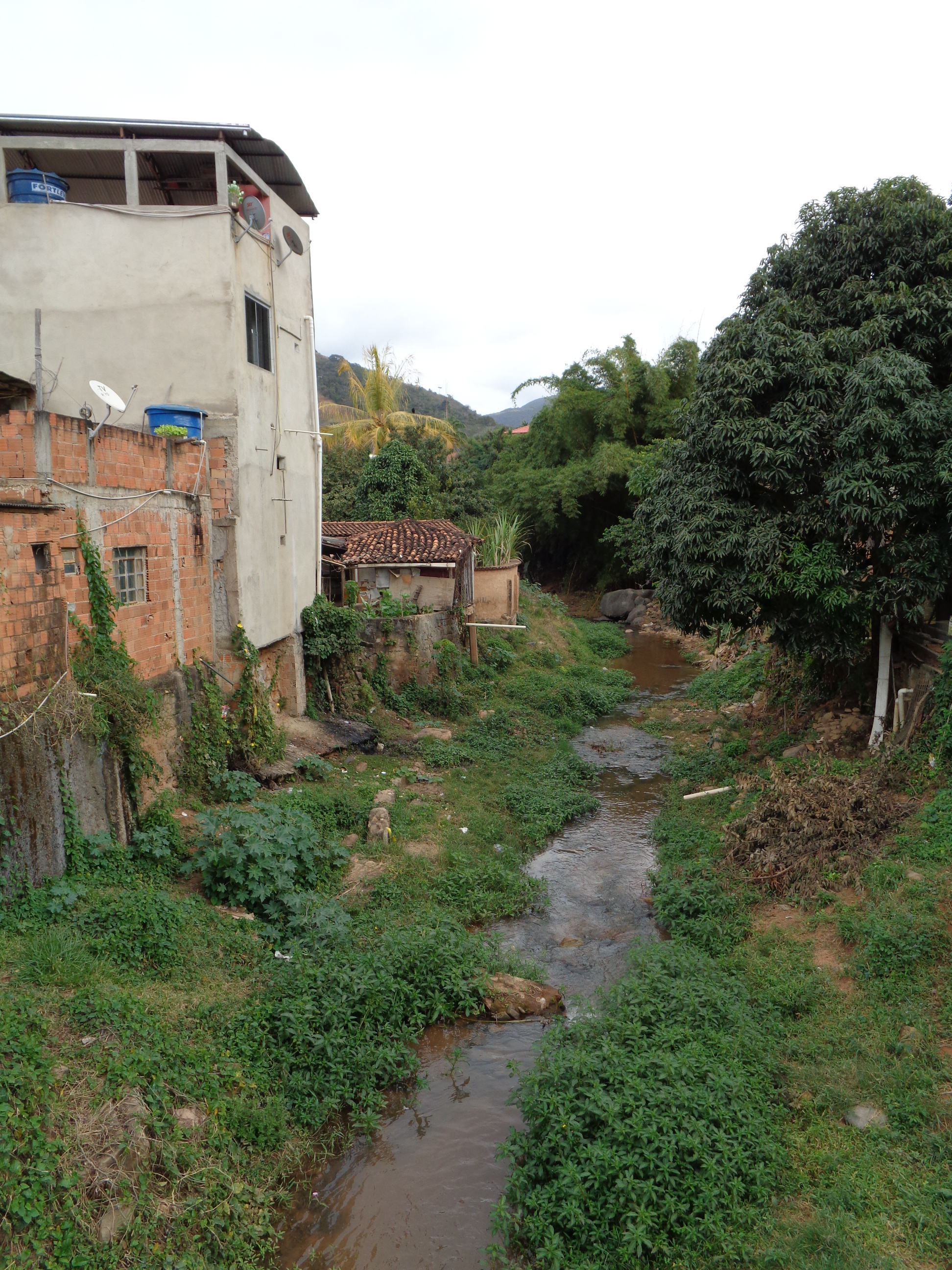 Habitações ao lado de córrego em Alvarenga, Minas Gerais, Brasil.